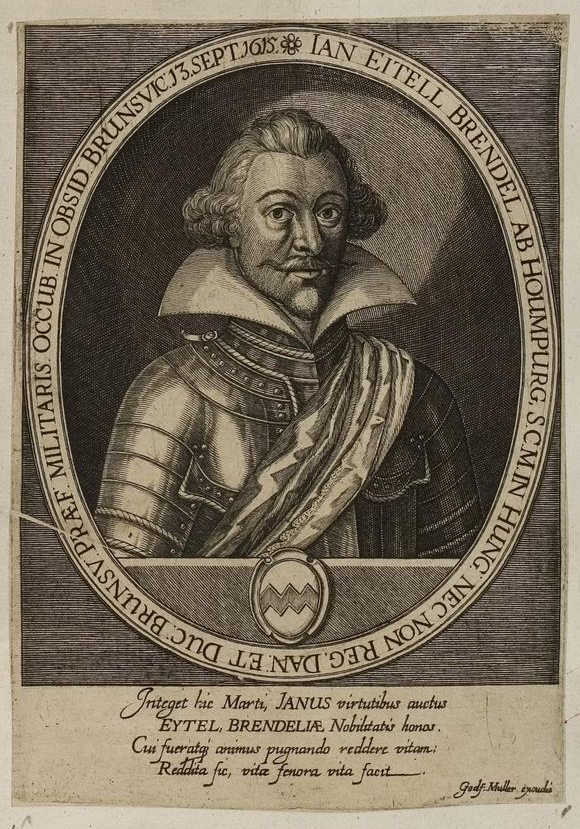 Grafik aus dem Klebeband Nr. 1 der Fürstlich Waldeckschen Hofbibliothek Arolsen Motiv: Johann Eitel Brendel von Homburg (1577–1615), Kaiserl. Reiterobrist; dann General in dänischen u. braunschweigischen Diensten; fiel bei der Belagerung von Braunschweig durch Herzog Friedrich Ulrich.